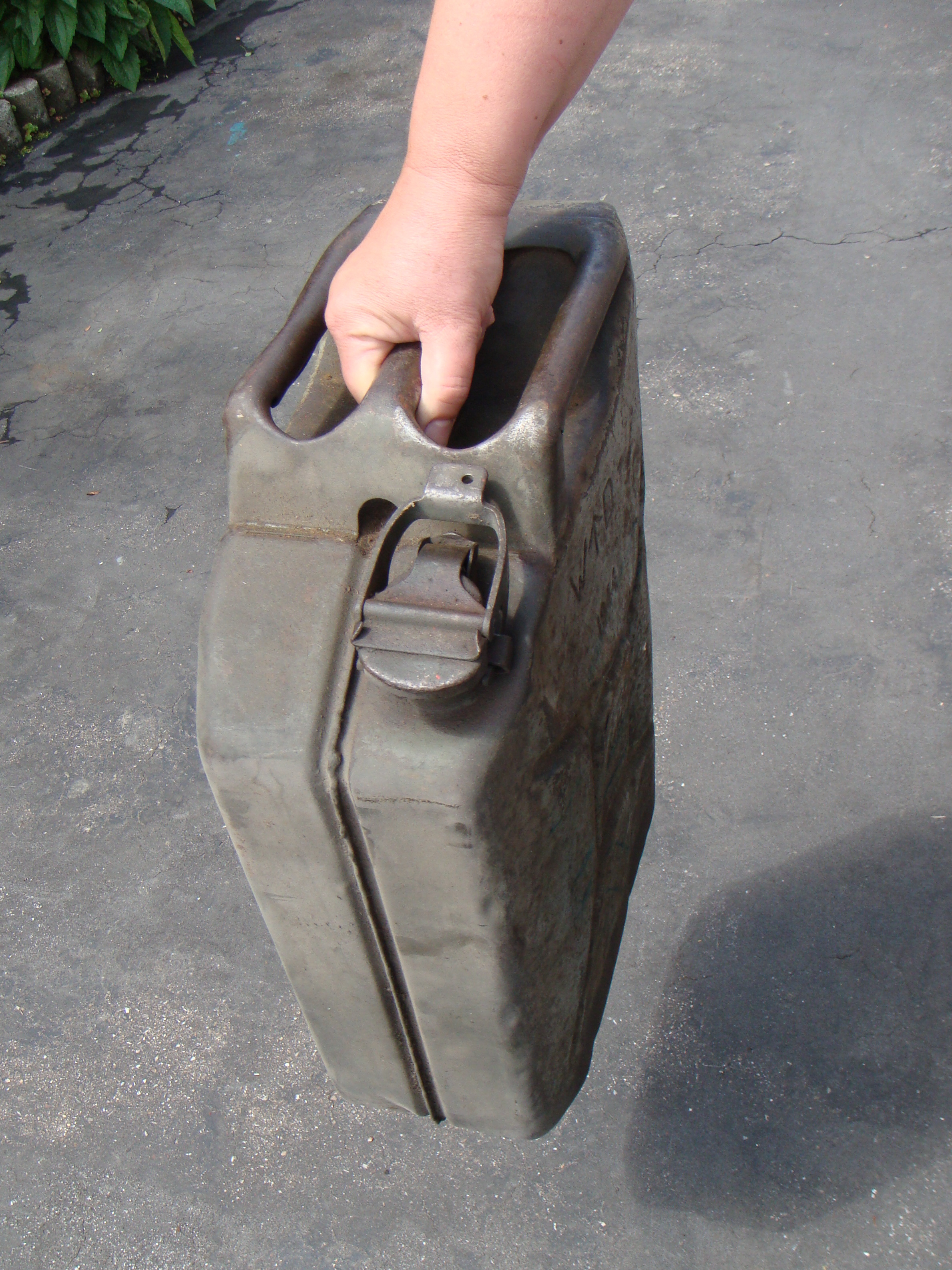 Jerrycan Einmann Tragweise